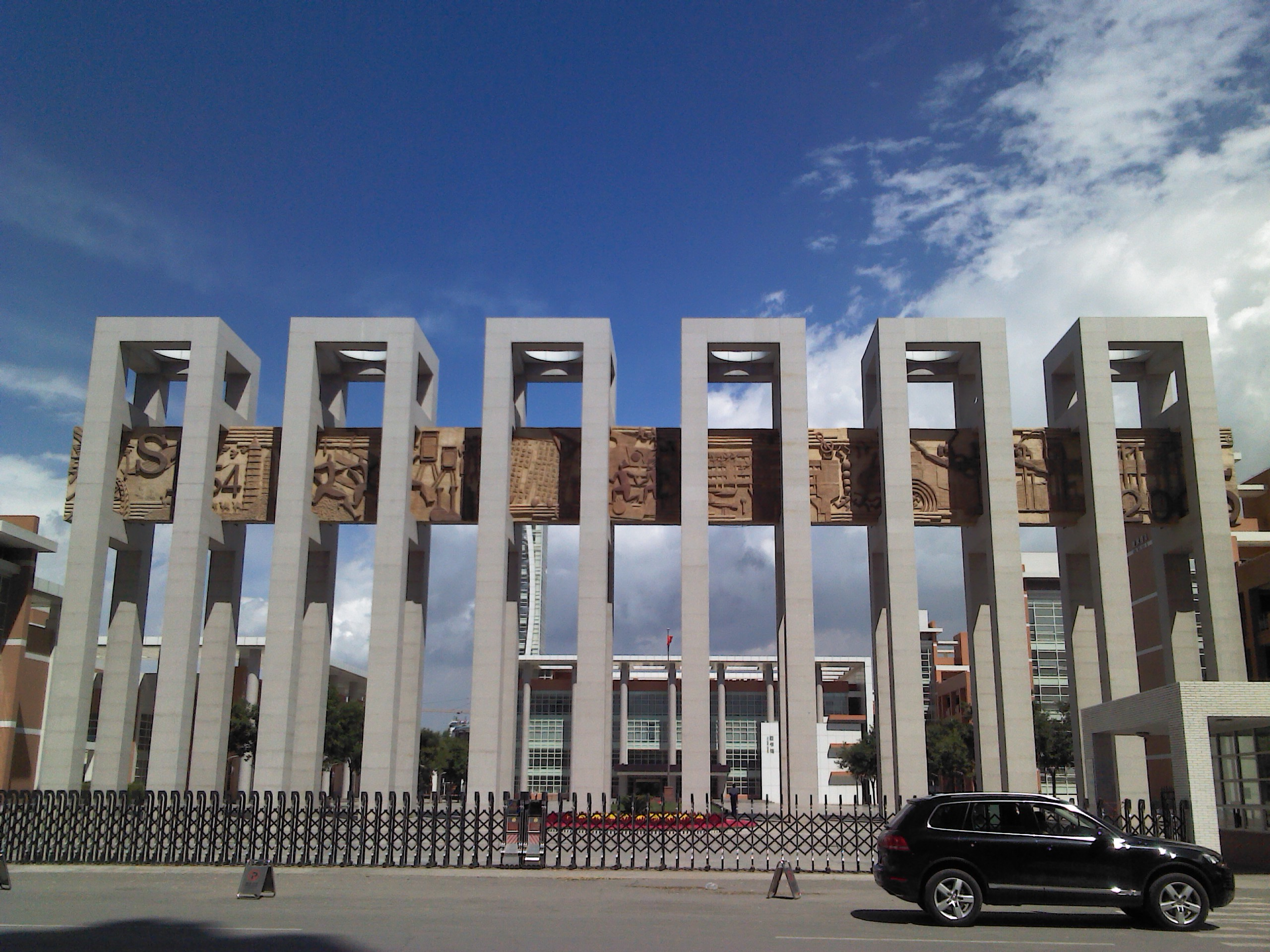 银川二中校门